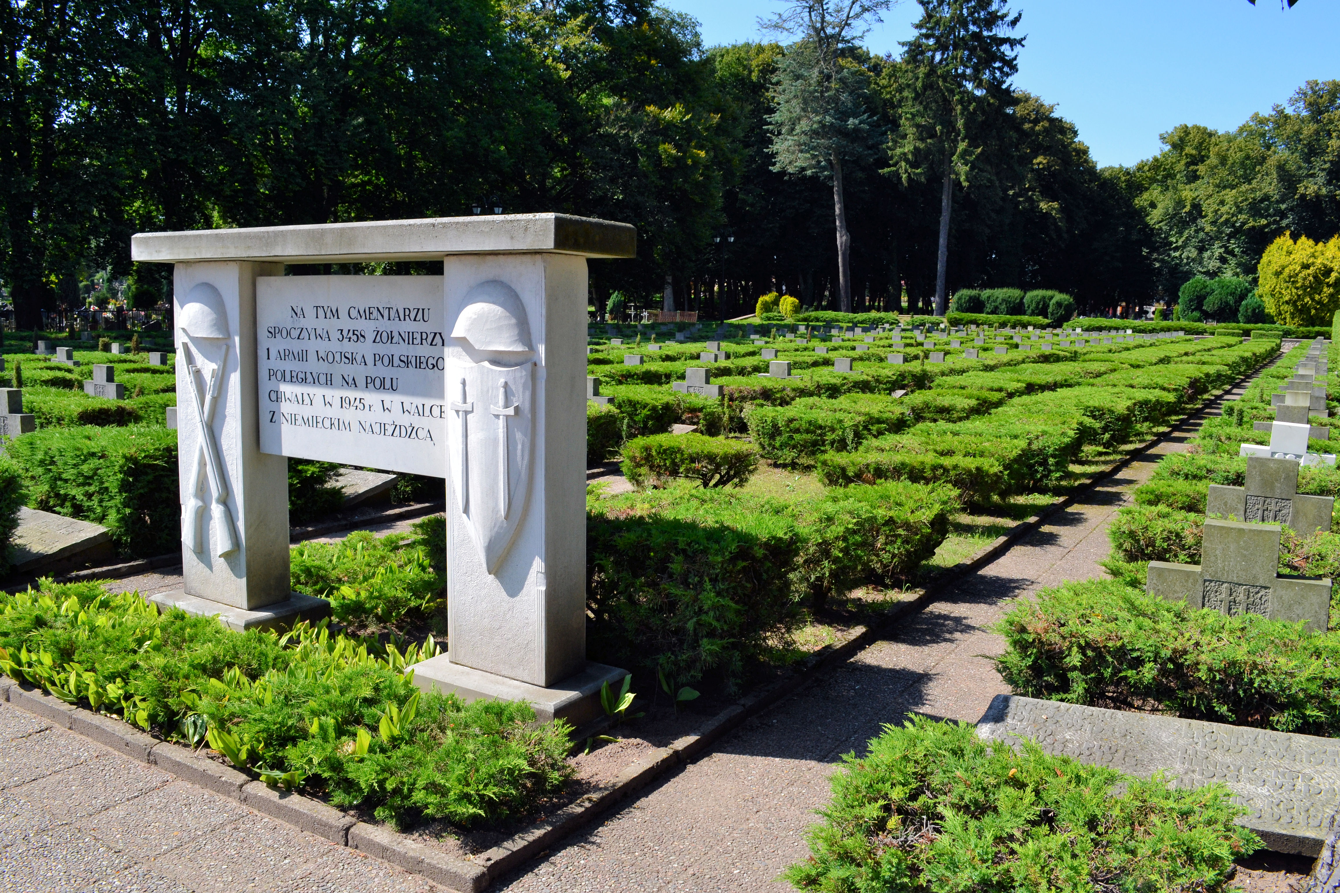 Cmentarz wojenny w Drawsku Pomorskim